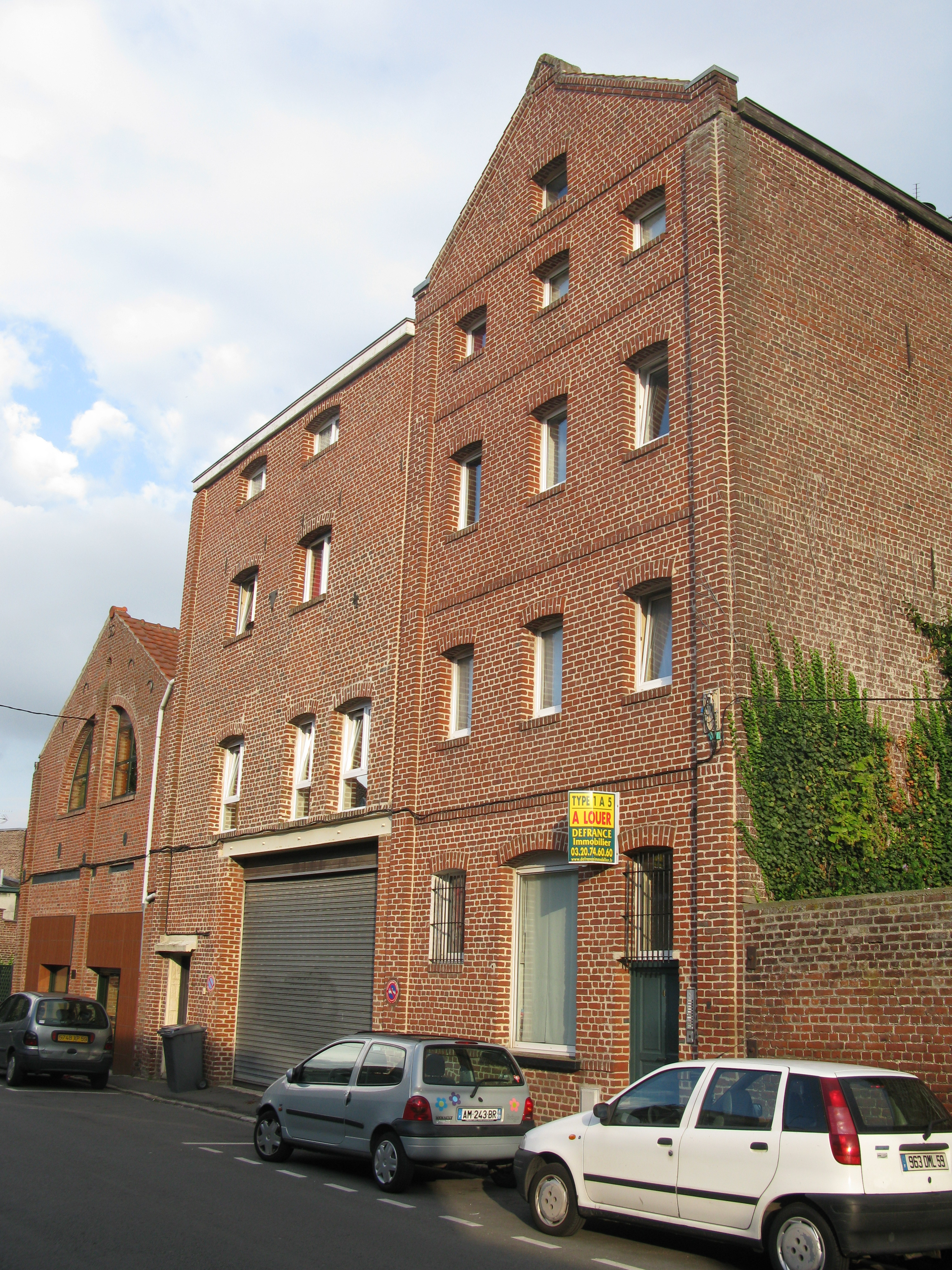 Ancienne minoterie reconvertie en immeuble, rue Gaston Baratte, Villeneuve d'Ascq